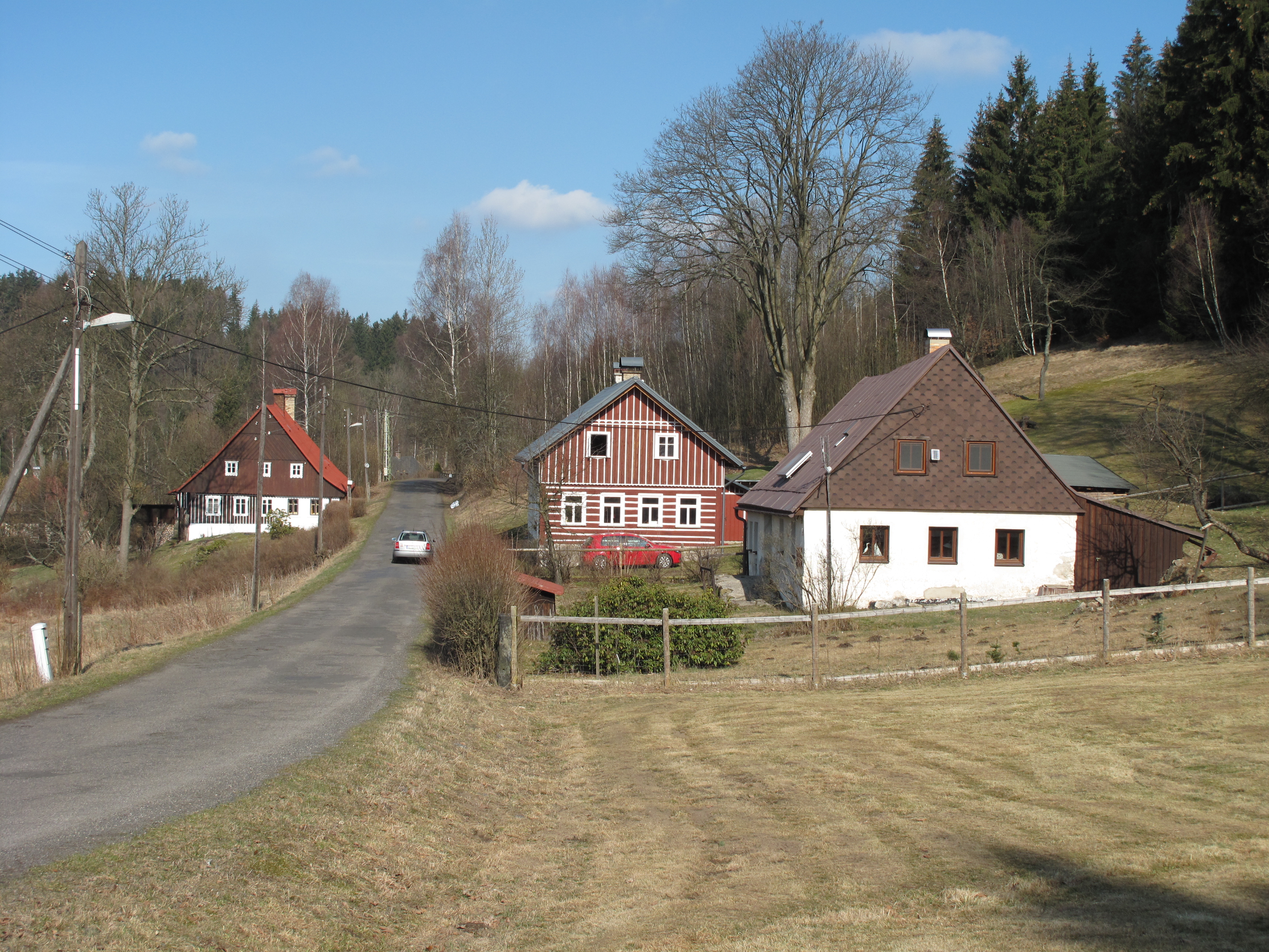 Domy v Jindřichově. Okres Jablonec nad Nisou, Česká republika.